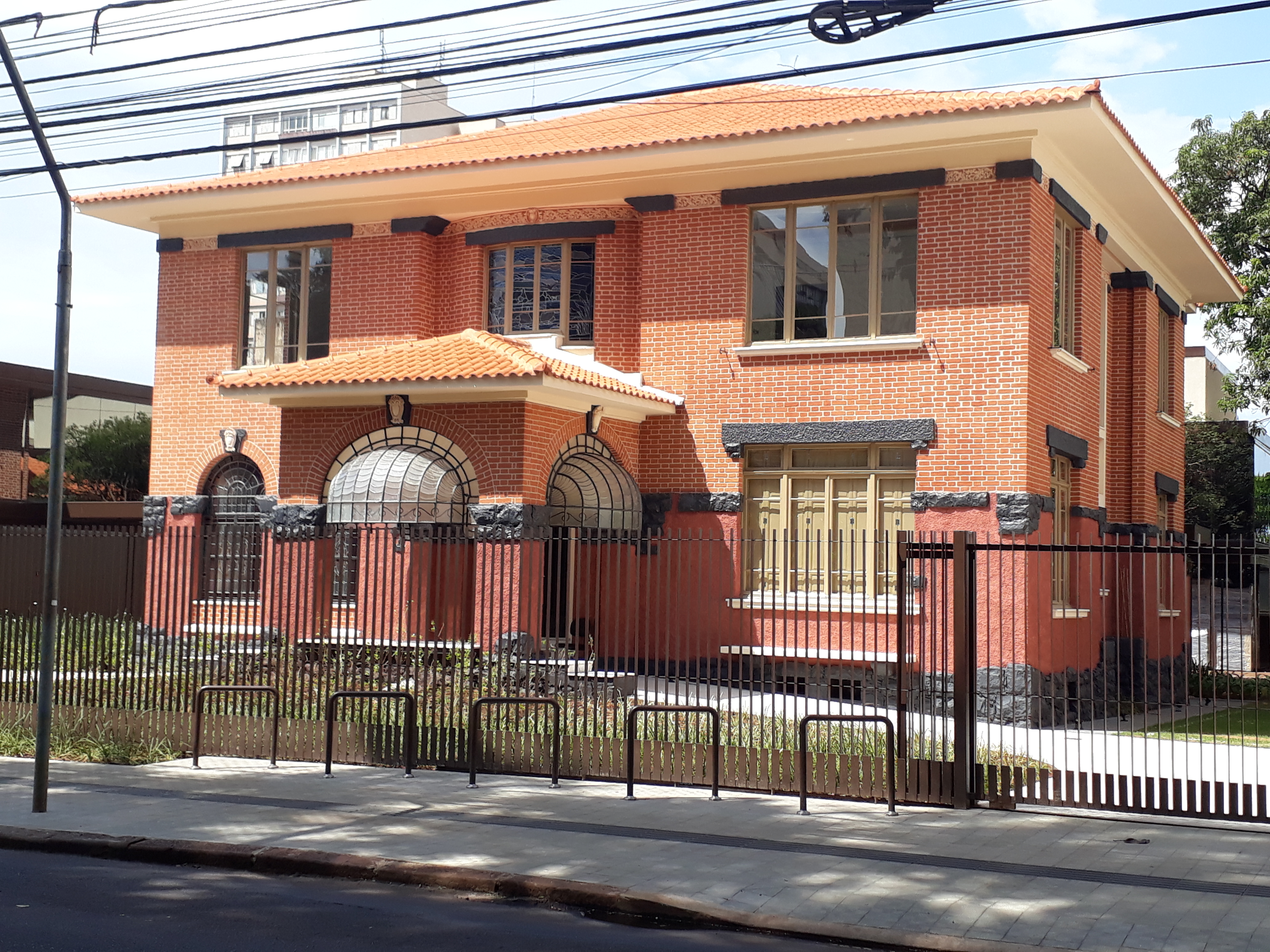 A Biblioteca Altino Arantes, que foi projetada pelo escritório de Ramos de Azevedo, foi construída em 1955. Foi restaurada e rebatizada de Sinhá Junqueira.